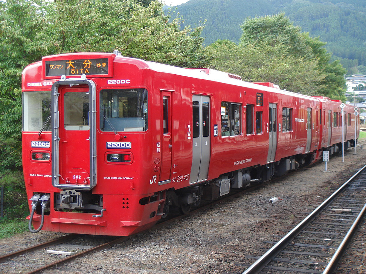 由布院駅構内に留置中のJR九州キハ200系気動車220形